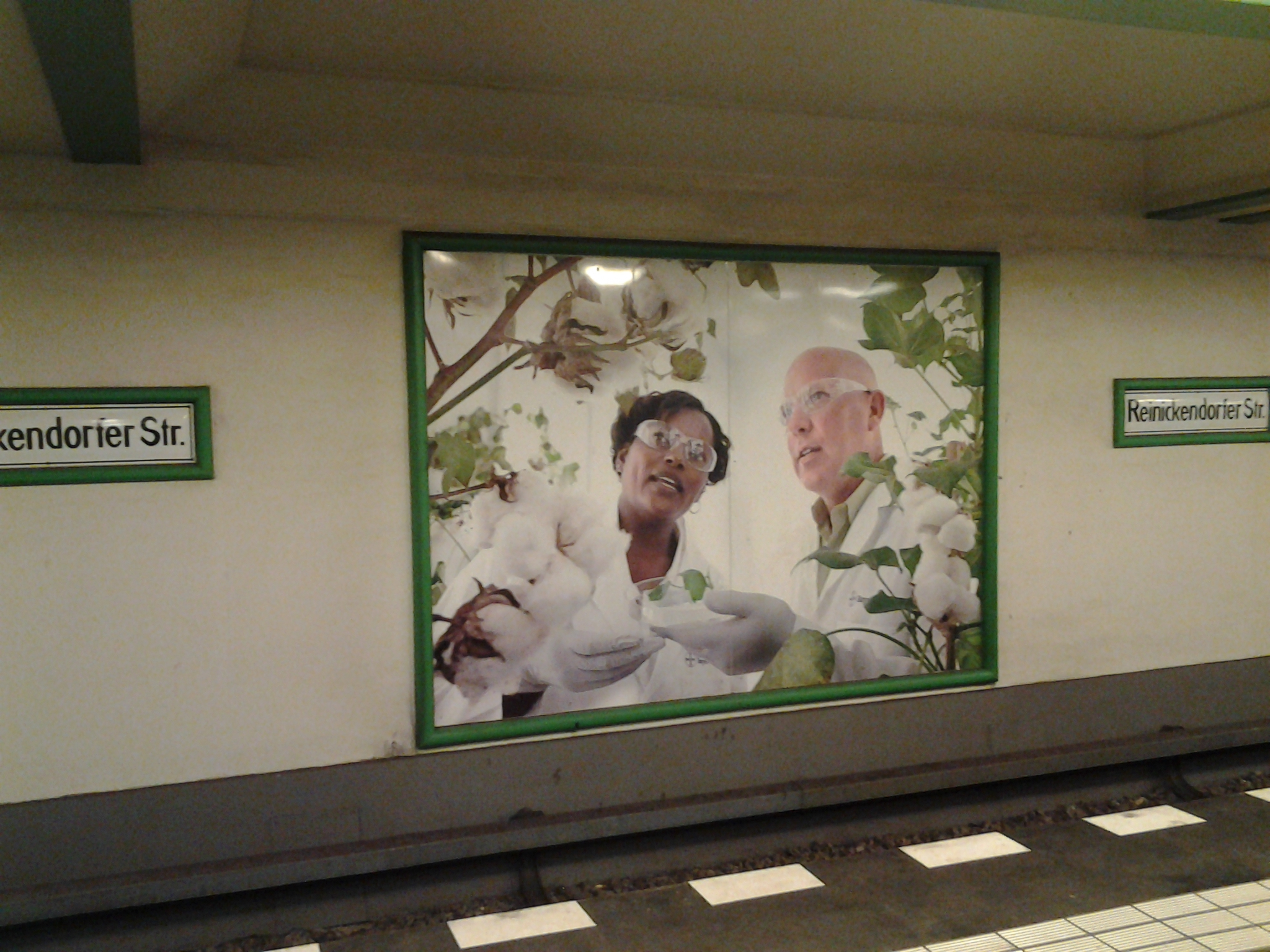 publicité de Bayer dans la station de métro Reinickendorfer Straße